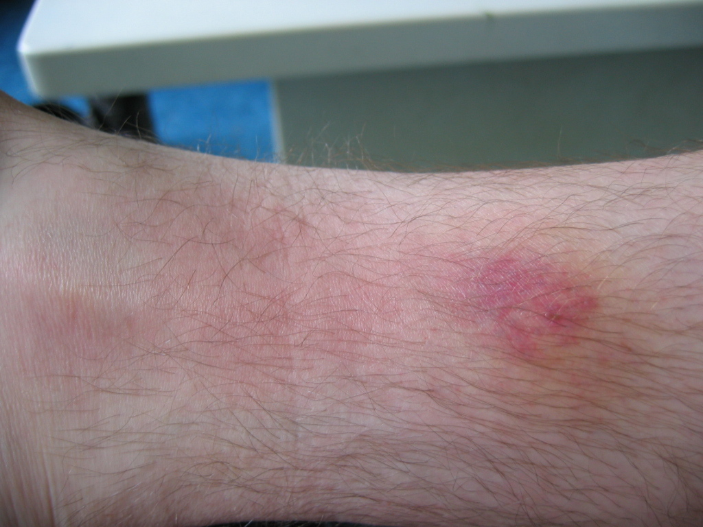 Deze afbeelding toont een enkel met de beet van een daas en de daar aan gerelateerde bacteriële infectie. Het betreft mijn eigen enkel die ik zelf heb gefotografeerd. Deze afbeelding mag gebruikt worden onder: CC-BY